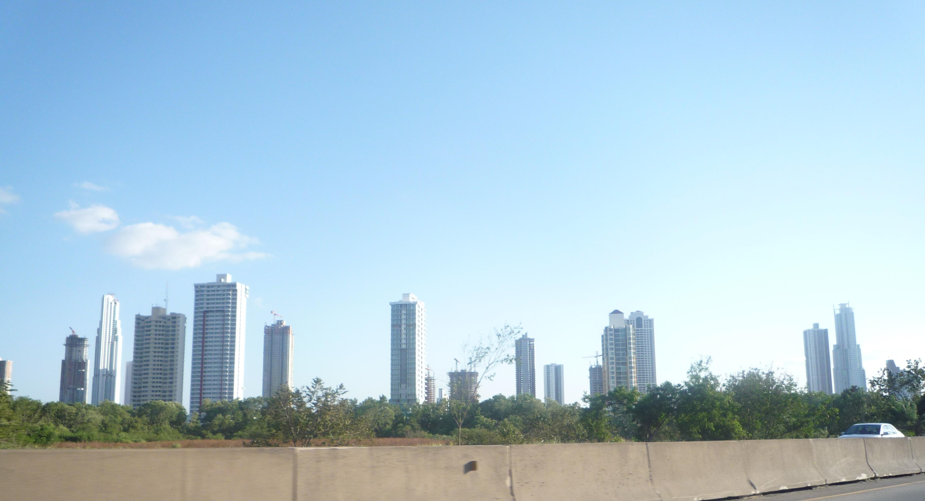 Costa del Este, Ciudad de Panamá.